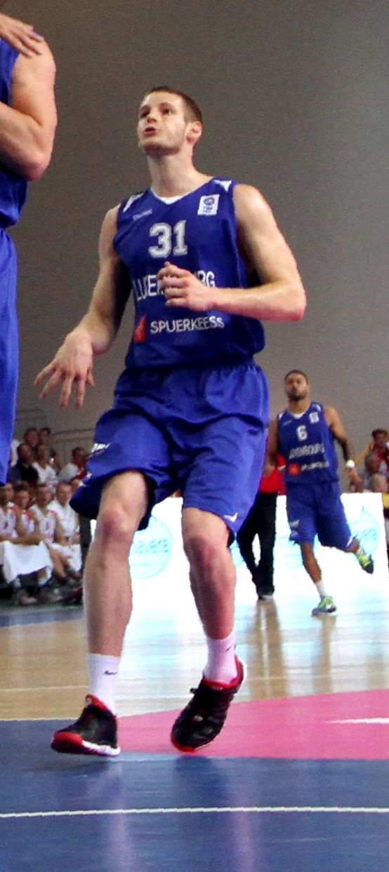 Eliminacje do EuroBasketu 2015: Polska – Luksemburg, Koszalin, 27 sierpnia 2014. Michał Michalak